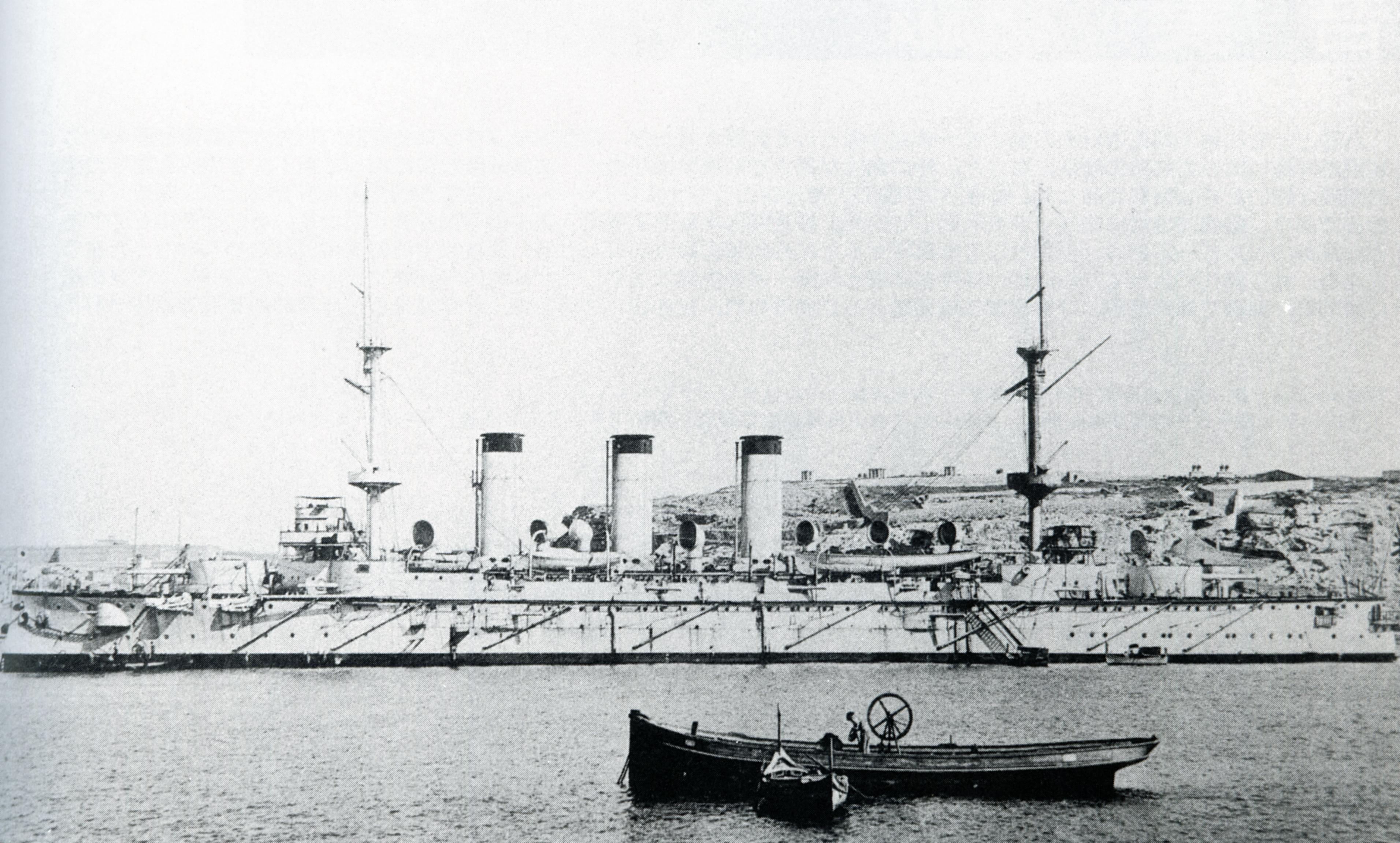 IJN Yakumo at Kobe